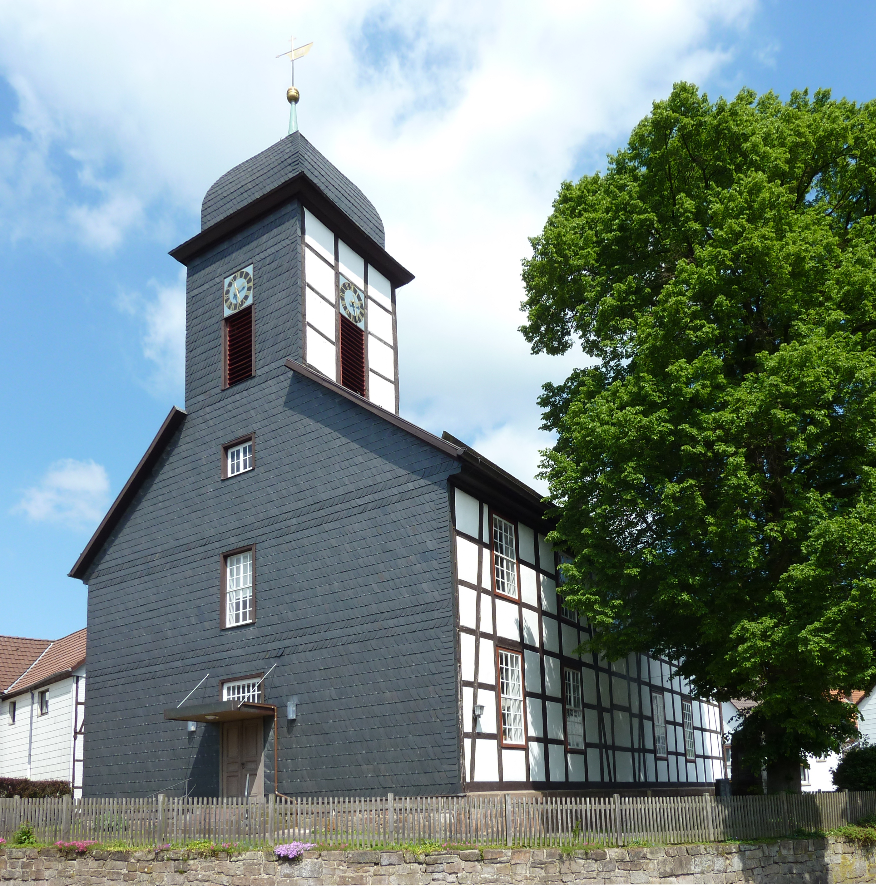 Ev.-luth. St. Georgkirche in Volpriehausen, Stadt Uslar, Niedersachsen. Schlichte klassizistische Fachwerkkirche, erbaut 1839/40, zweiseitig mit Schiefer behängt